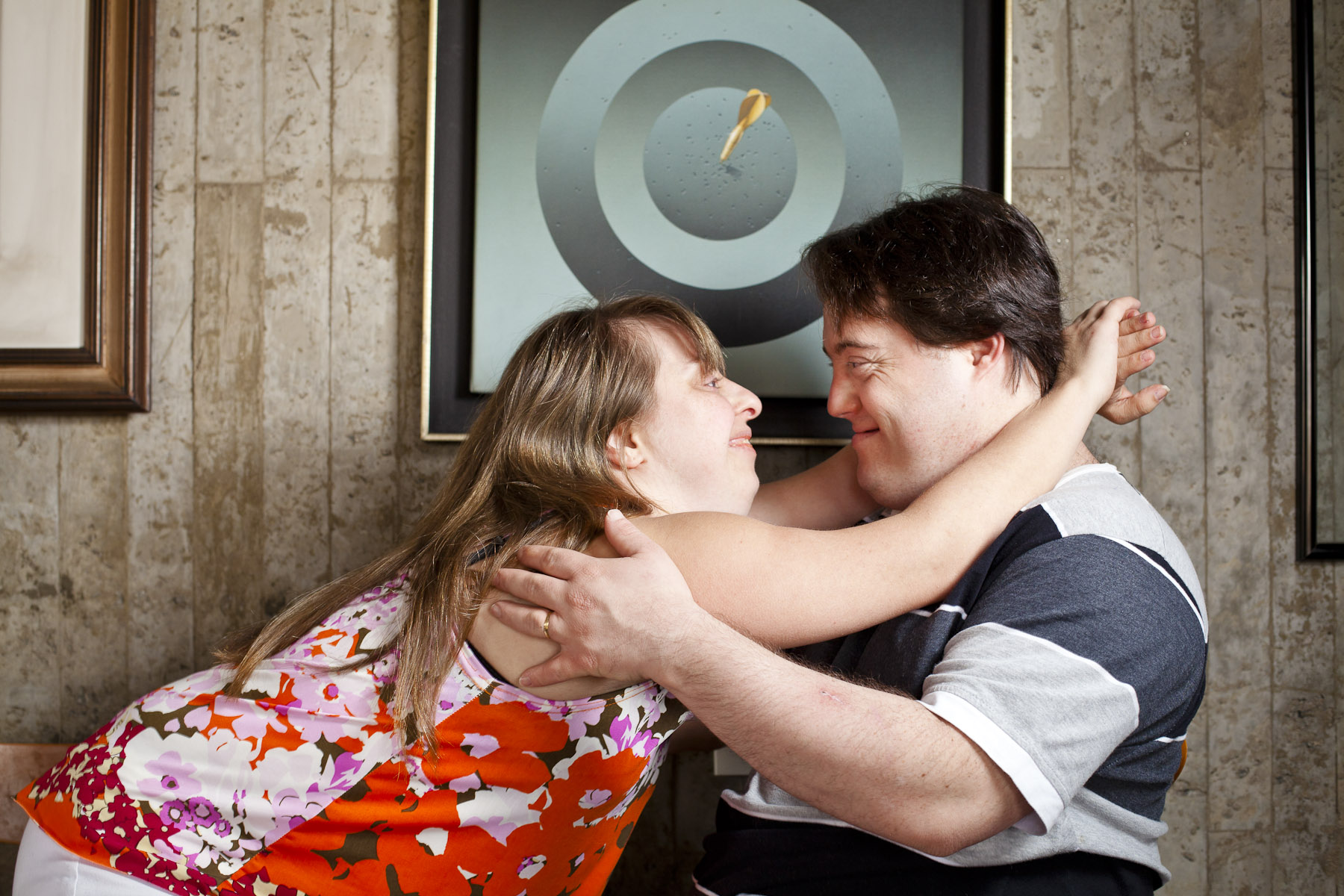 SÃO PAULO, SP, BRASIL, 25-02-2013: Ariel Goldemberg e Rita Pokk, casal (casados na vida real) com sindrome de Down, sao atores protagonistas do filme Colegas que estreia essa semana. (Foto: Zé Carlos Barretta/Folhapress ILUSTRADA)